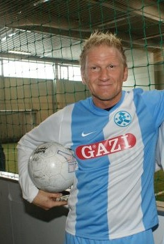 Dirk Wüllbier 2009 bei einem Hallenturnier